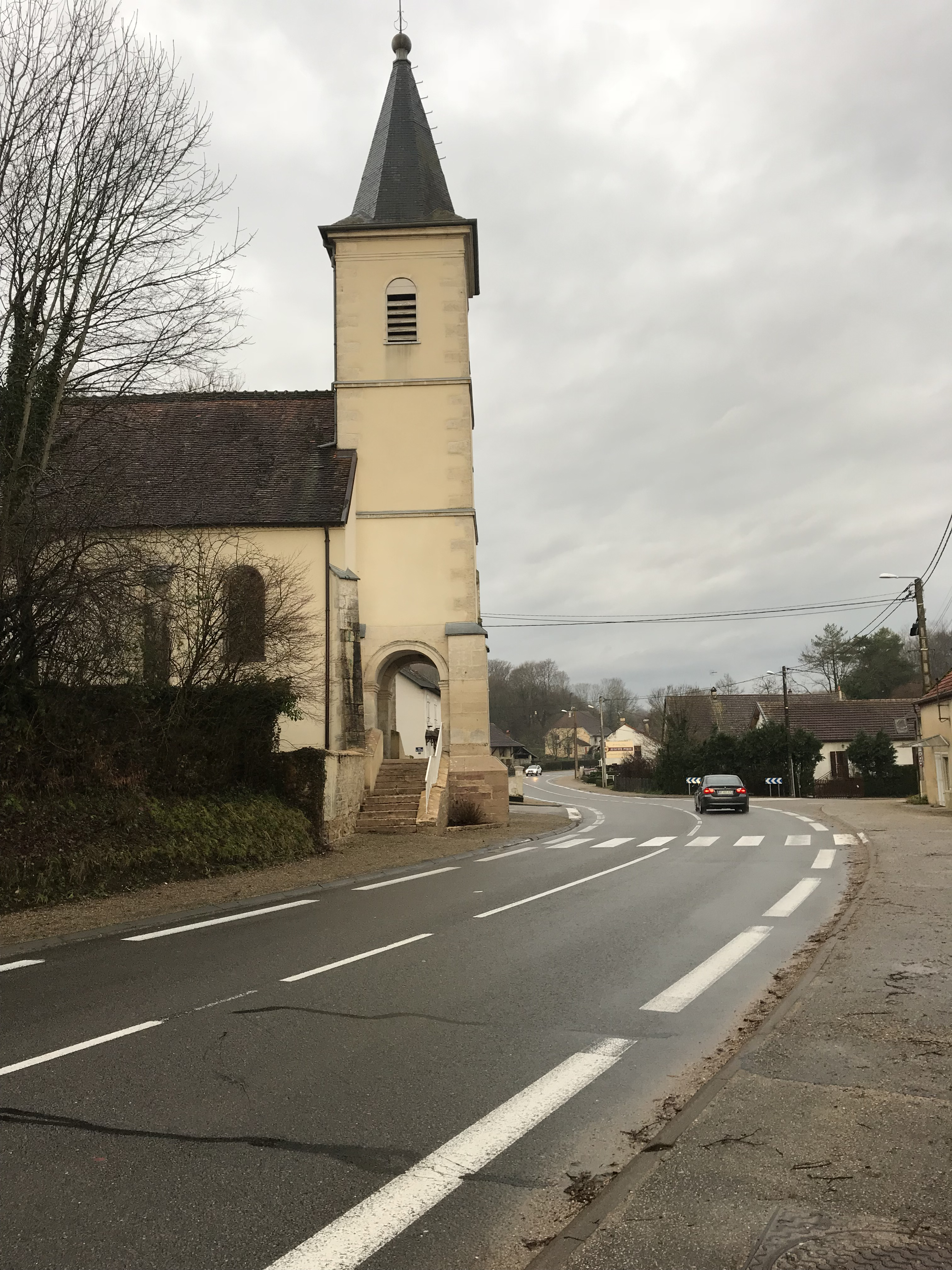 Nevy-lès-Dole (Jura, France) le 6 janvier 2018.